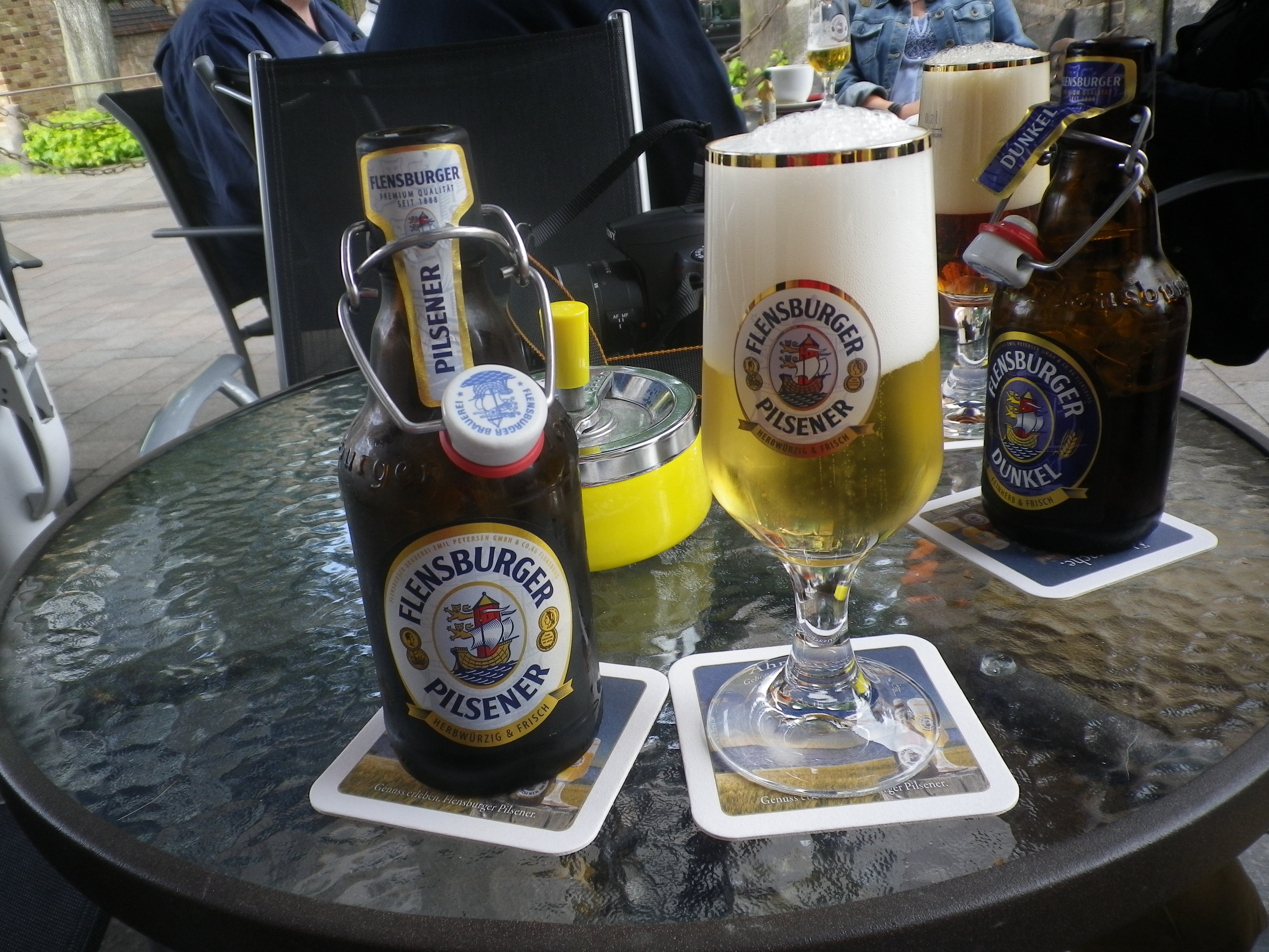 En Flensburger Pilsener i förgrunden och en Flensburger Dunkel i bakgrunden.